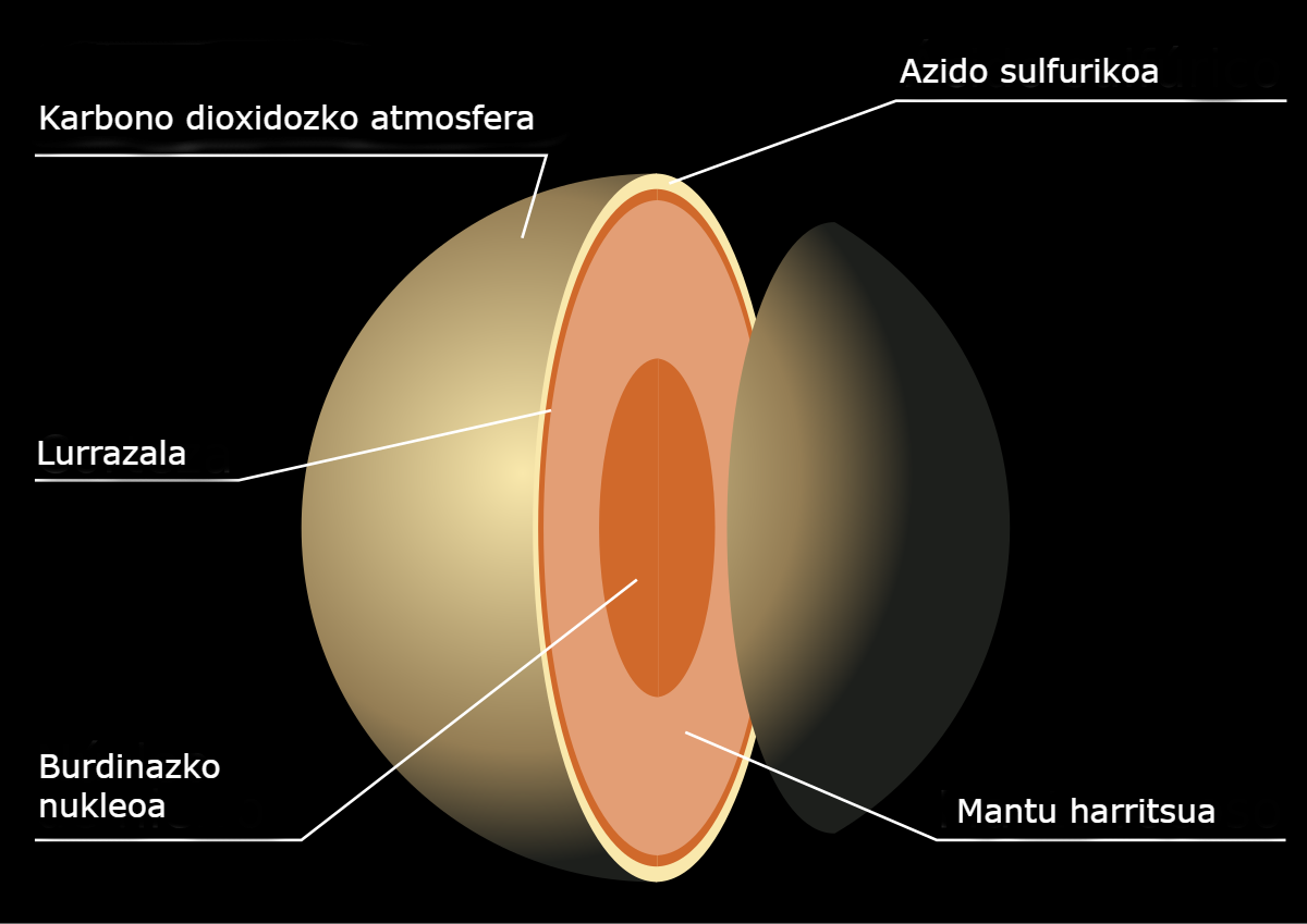 Artizarraren osaera ikus daiteke irudi honetan.